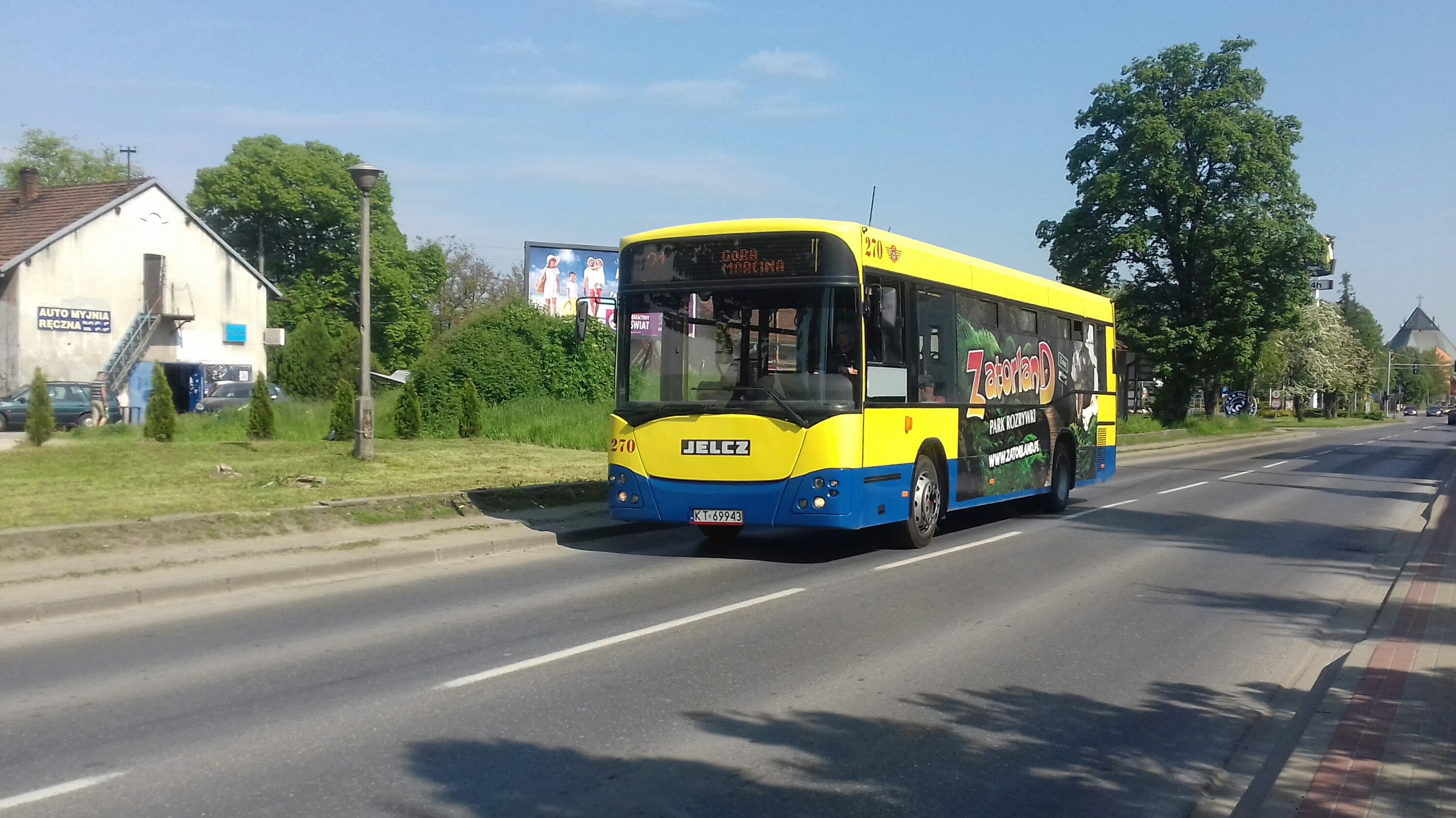 Jelcz M101I MPK Tarnów